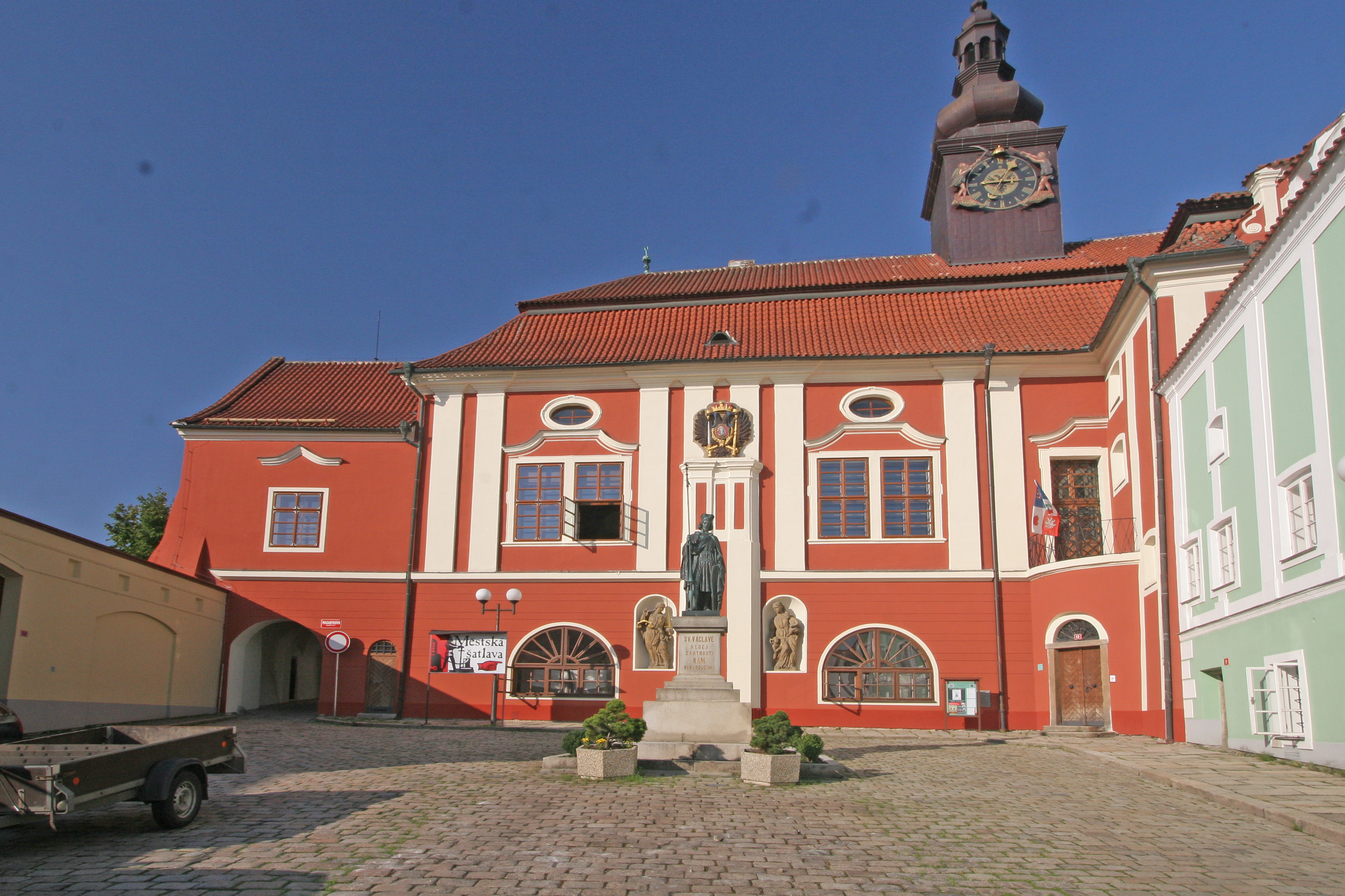 Zámek Pelhřimov, Masarykovo náměstí 12, Pelhřimov.